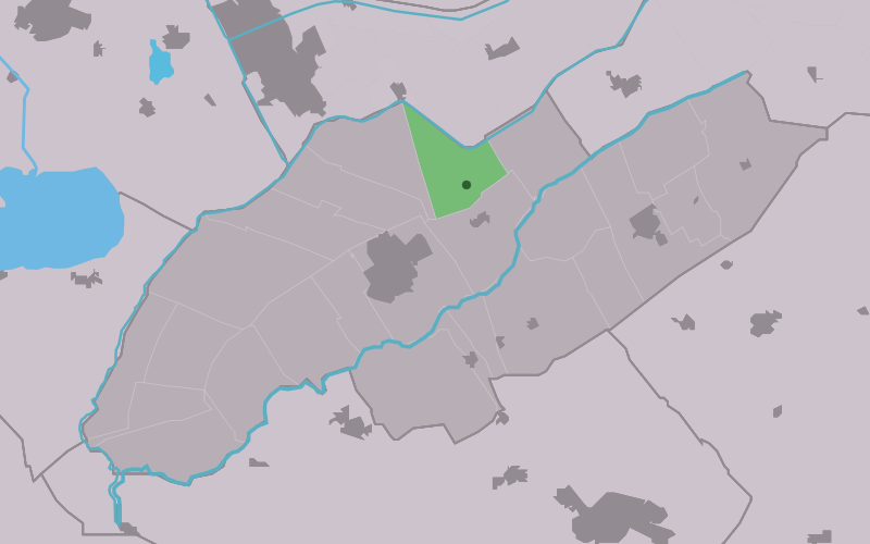 Kaartsje fan himrik fan Teridzert